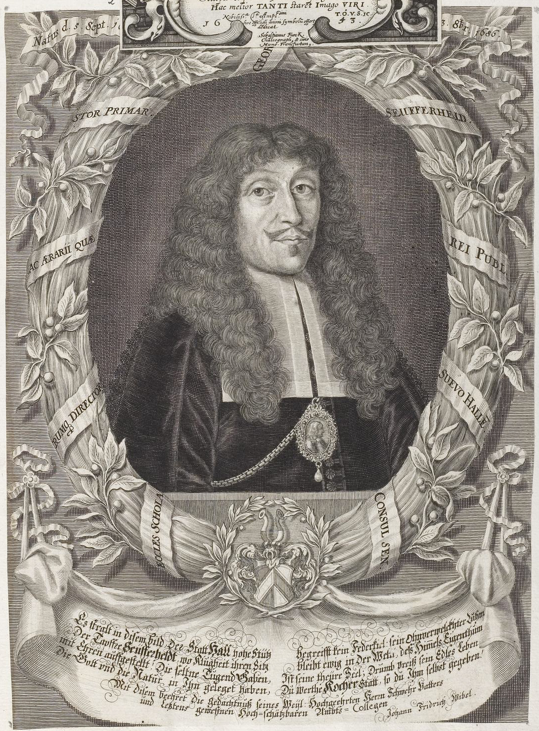 Grafik aus dem Klebeband Nr. 3 der Fürstlich Waldeckschen Hofbibliothek Arolsen Motiv: Georg Friedrich Seufferheld (1613–1686), Ratsherr und Stättmeister von Schwäbisch Hall GND: 124136036